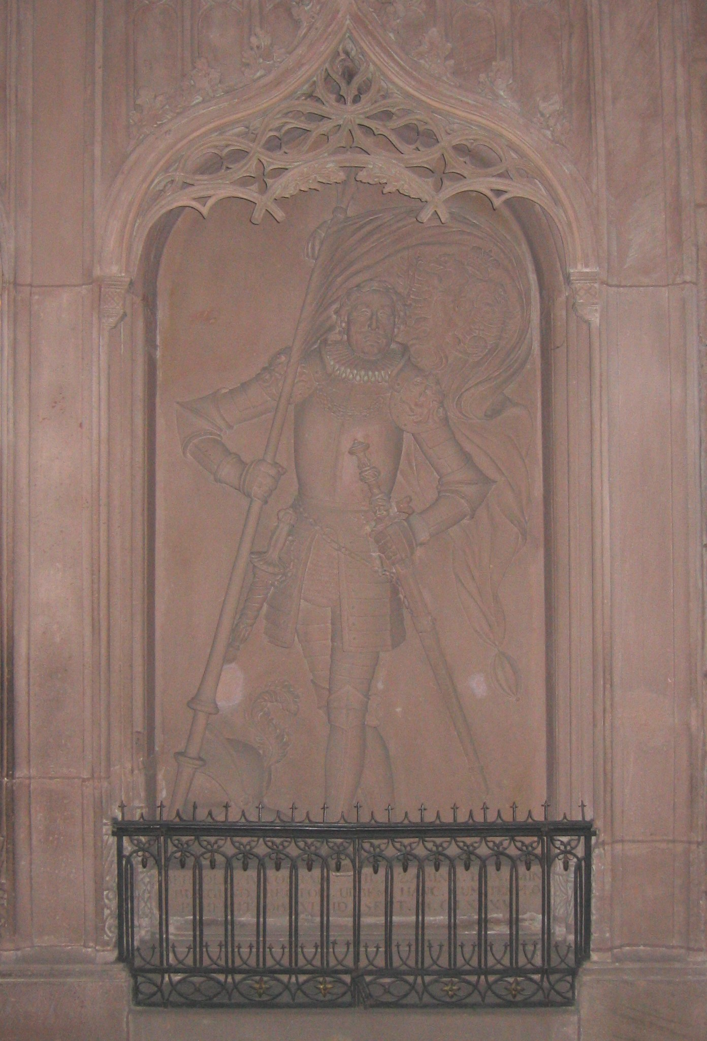 Bertold IV. (ca. 1125-1186), Relief im Chor des Freiburger Münsters